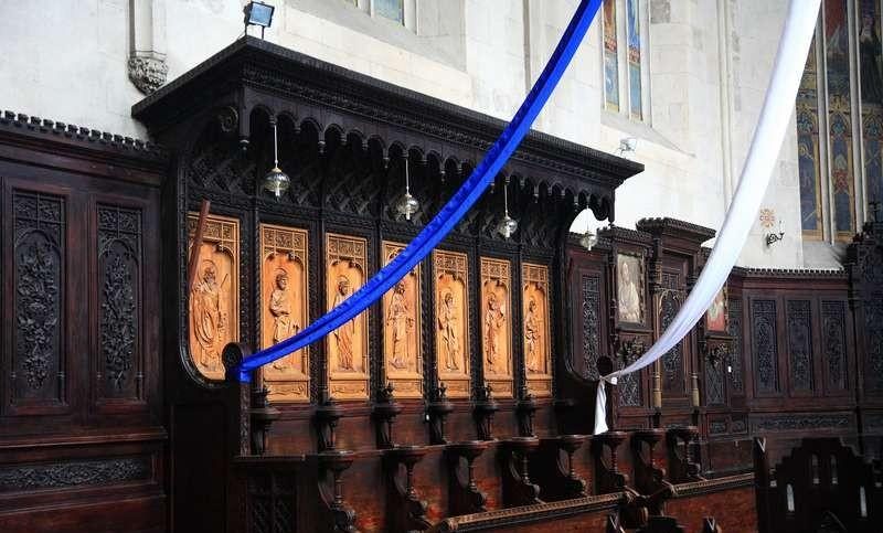 Katedra w Przemyślu